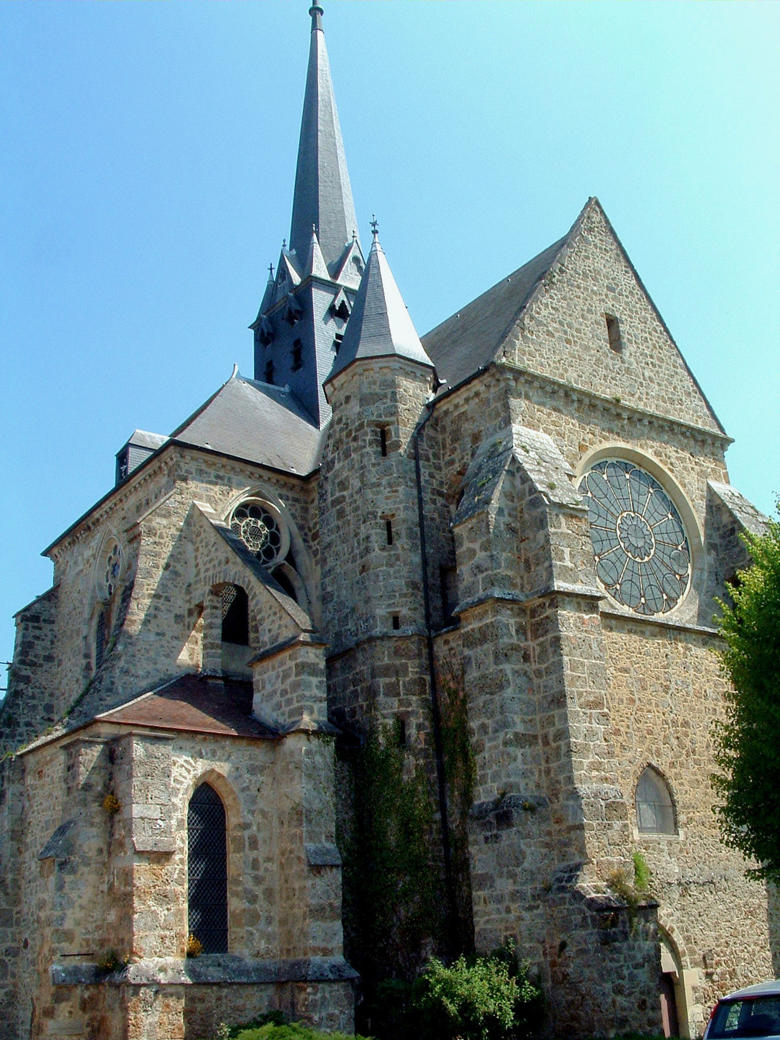 Orbais-l'Abbaye - Abbatiale